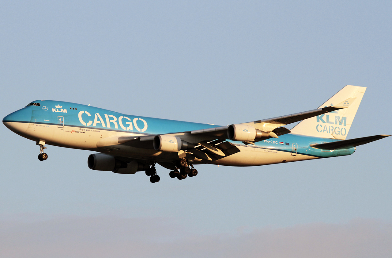 EHAM 2-8-2010